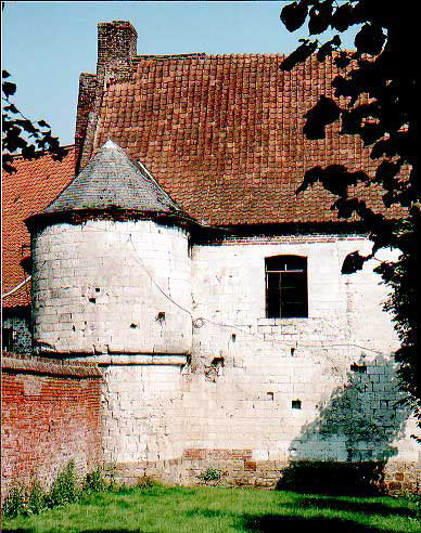 Tincques